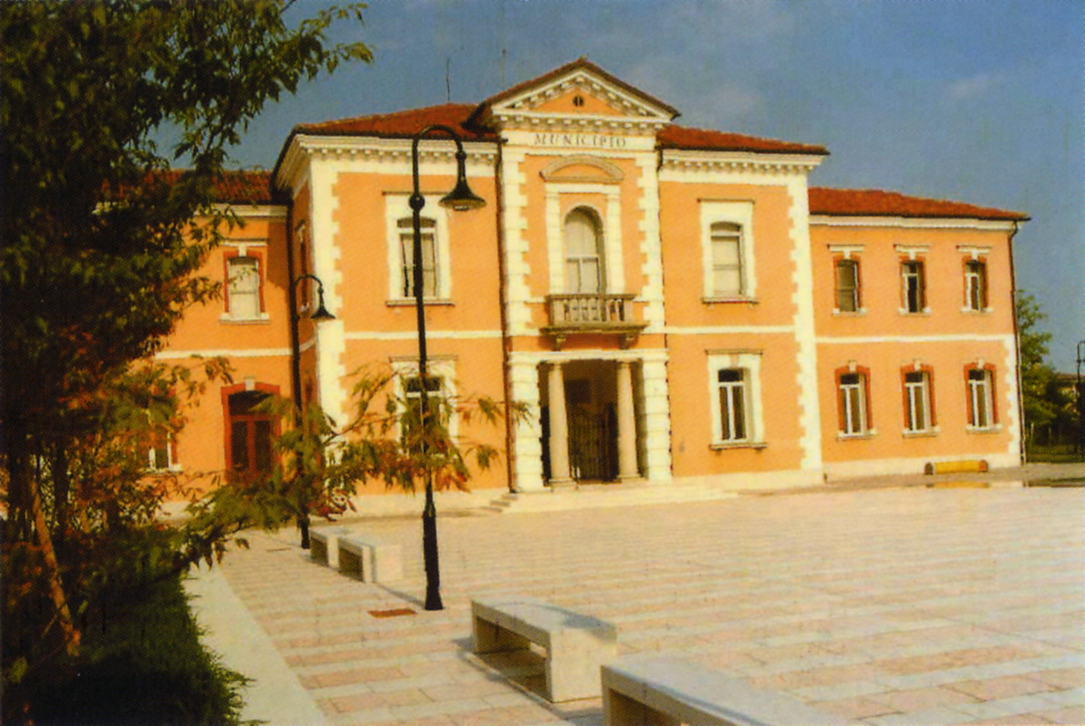 Municipio di Loria